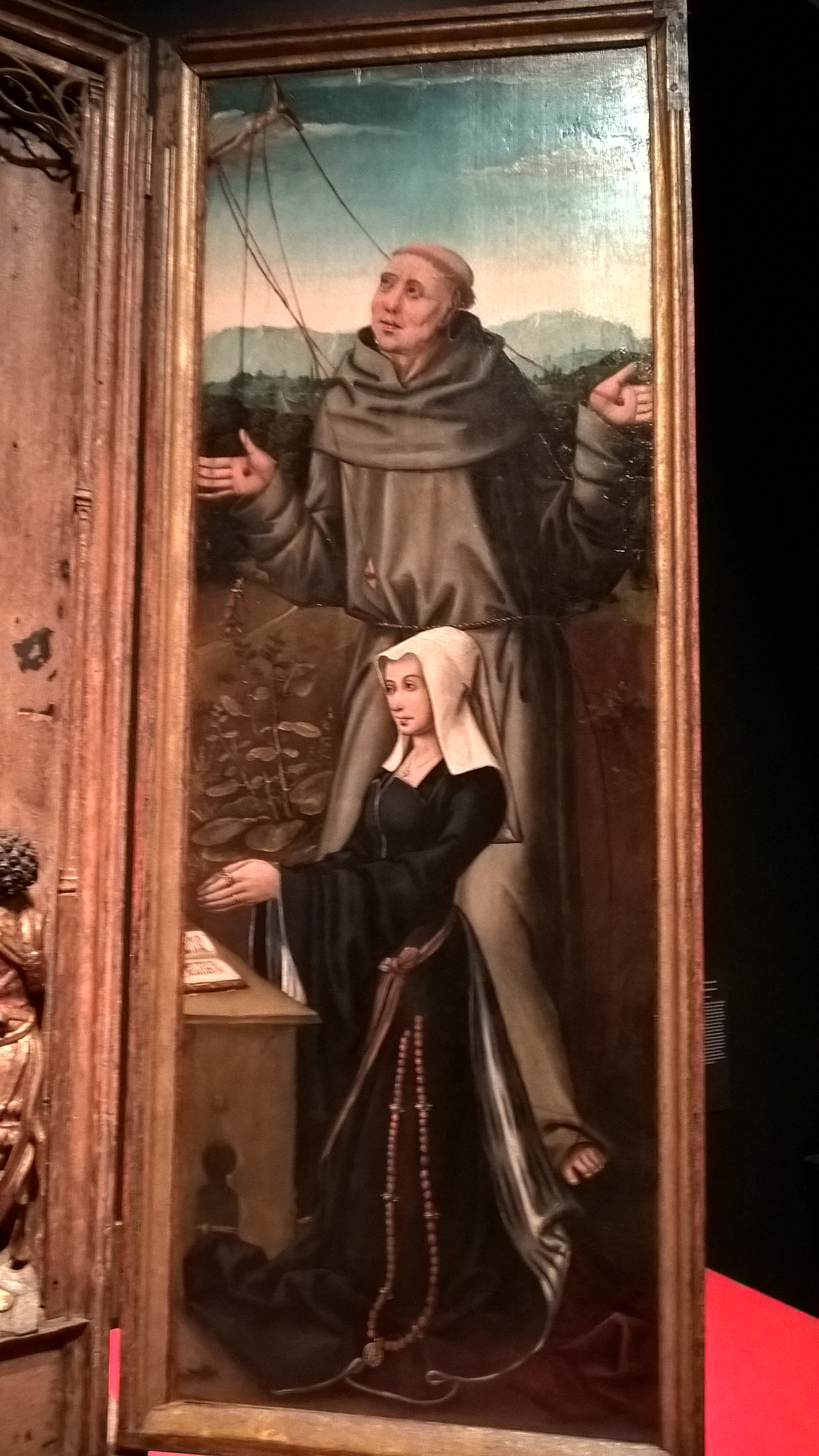 A doadora D. Isabel Afonso sob a proteção de S. Francisco de Assis, Painel direito do Retábulo dos Reis Magos, de Pieter Coecke van Aelst, de cerca de 1520, na Capela dos Reis Magos, no Estreito da Calheta, na Ilha da Madeira